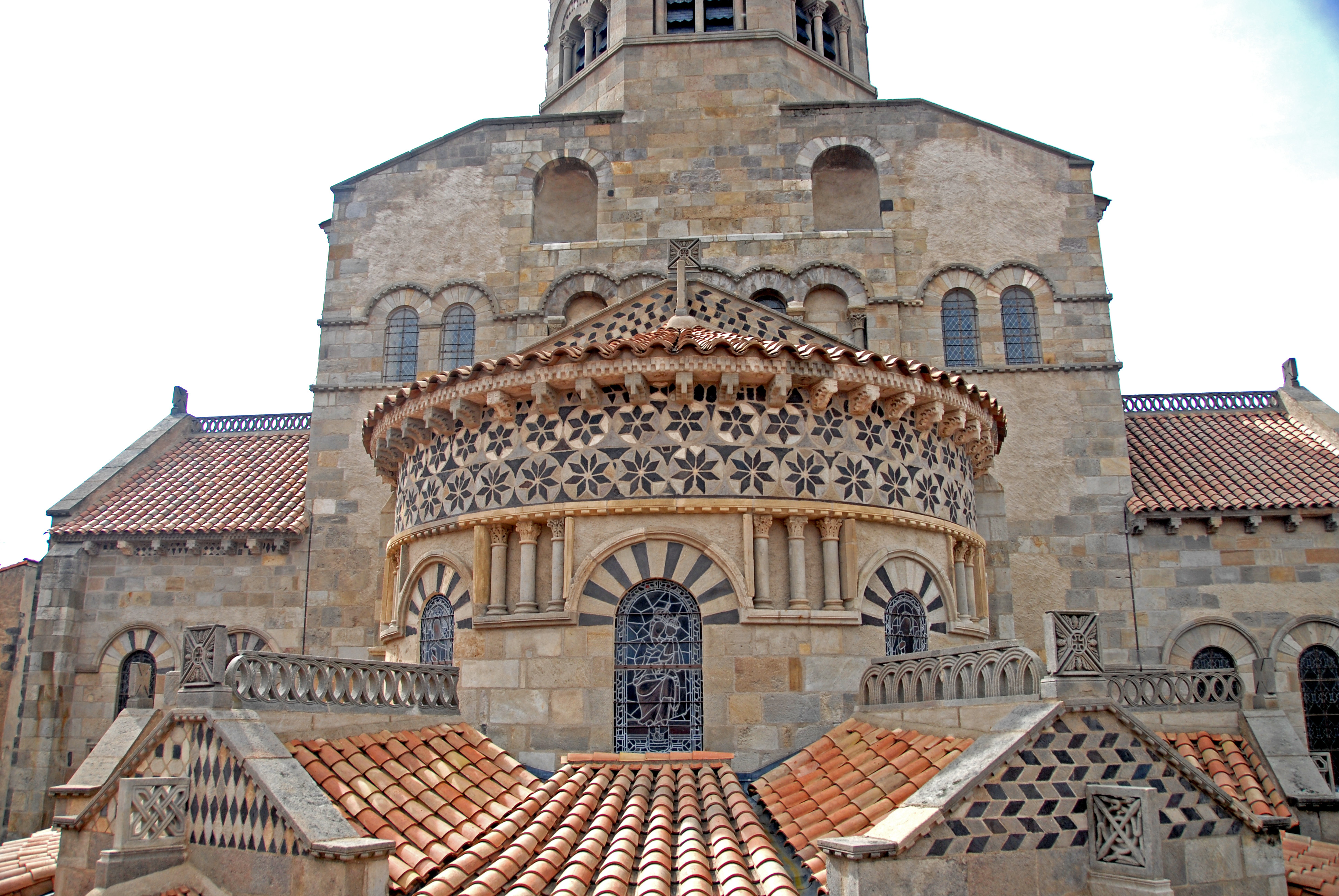 Notre-Dame du Port, massiv Barlon und Chorapsis